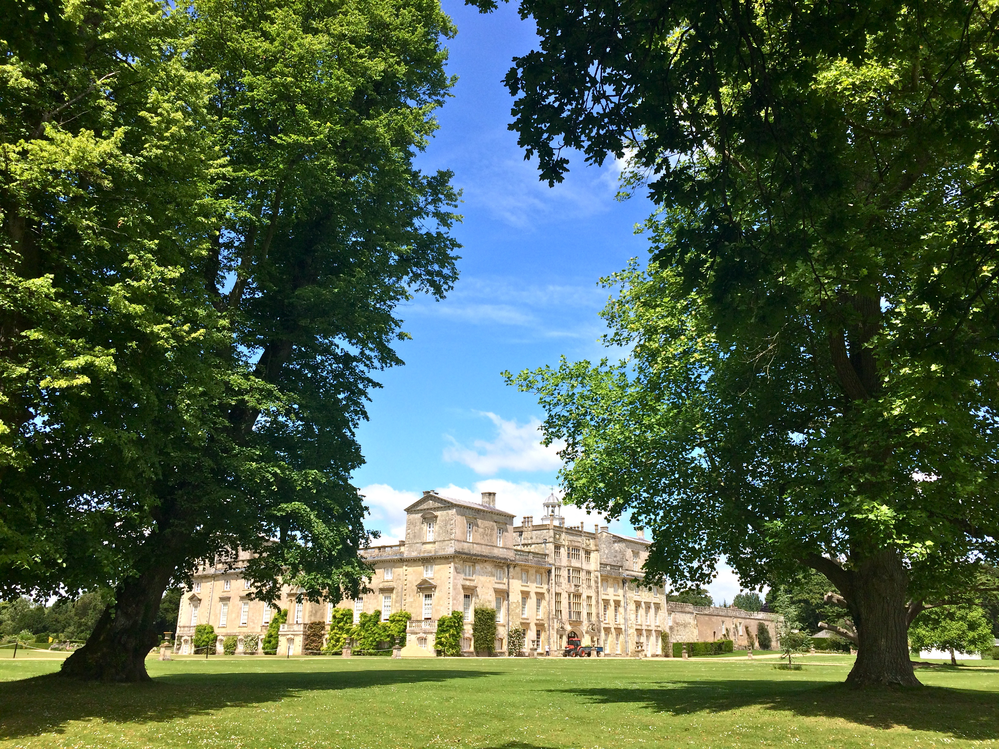 Wilton